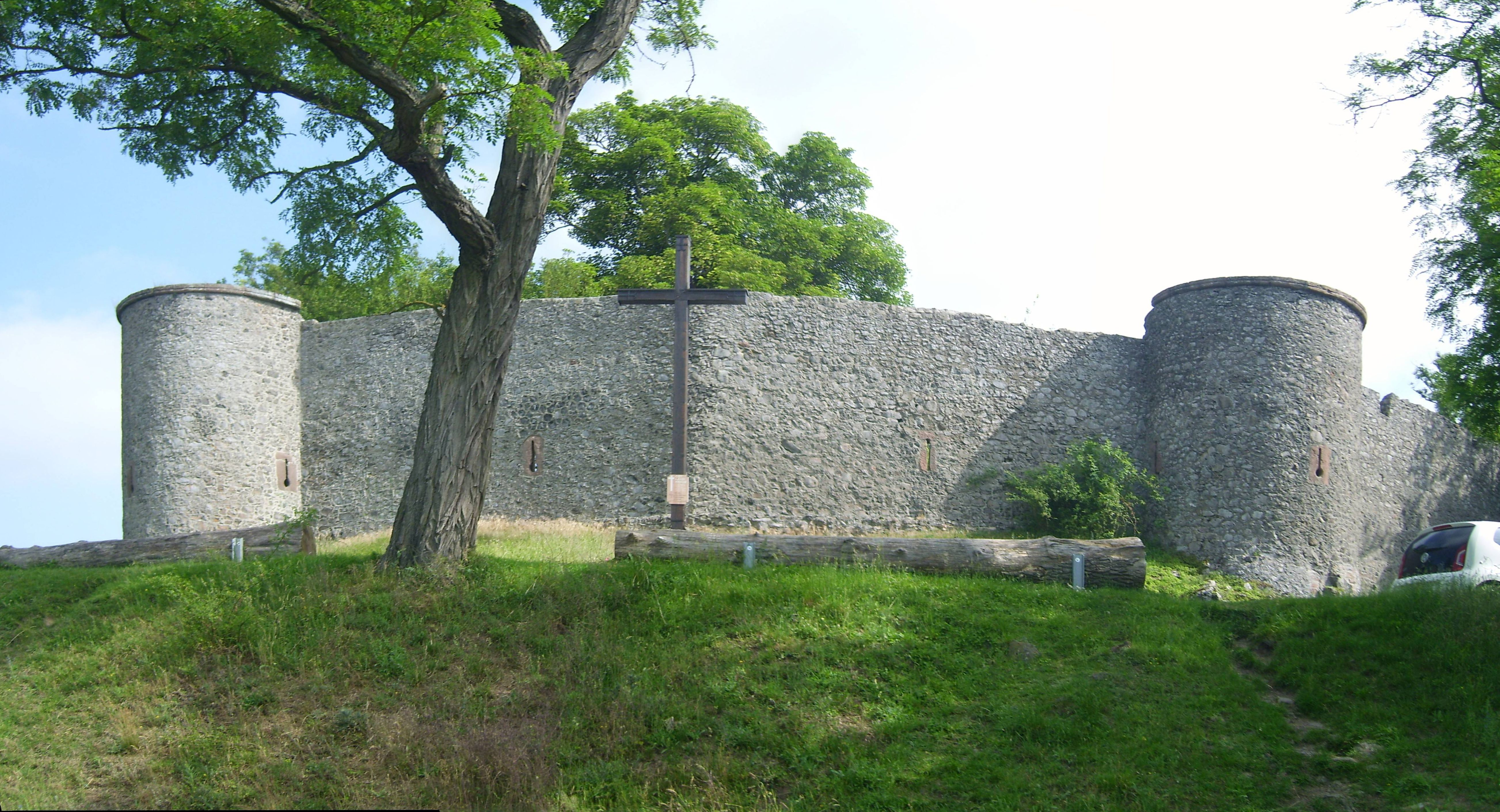 Innenhof der Burg Amöneburg